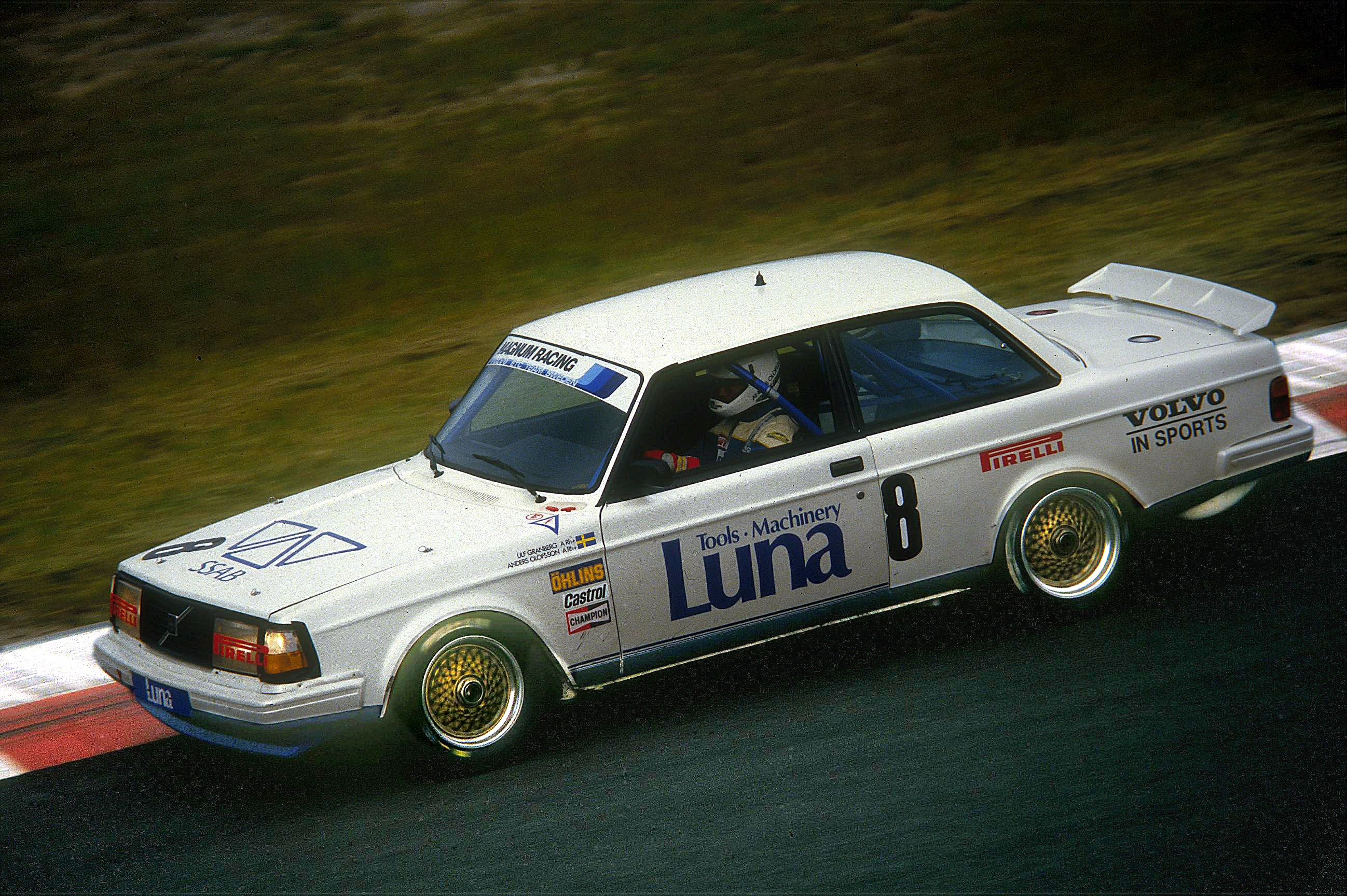 Volvo 240 Turbo, gefahren von Anders Olofsson, beim Training zum 6-Stunden-Rennen auf dem Nürburgring